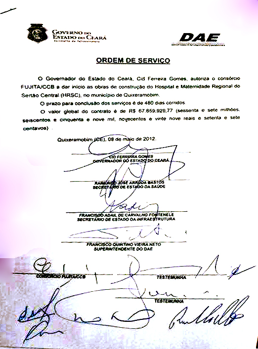 Ordem de Serviço pela qual o Governo do Estado do Ceará autoriza a construção do Hospital e Maternidade do Sertão Central, em Quixeramobim.